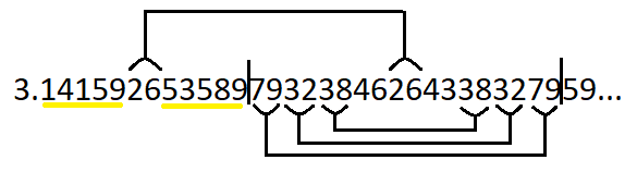 pi cifre